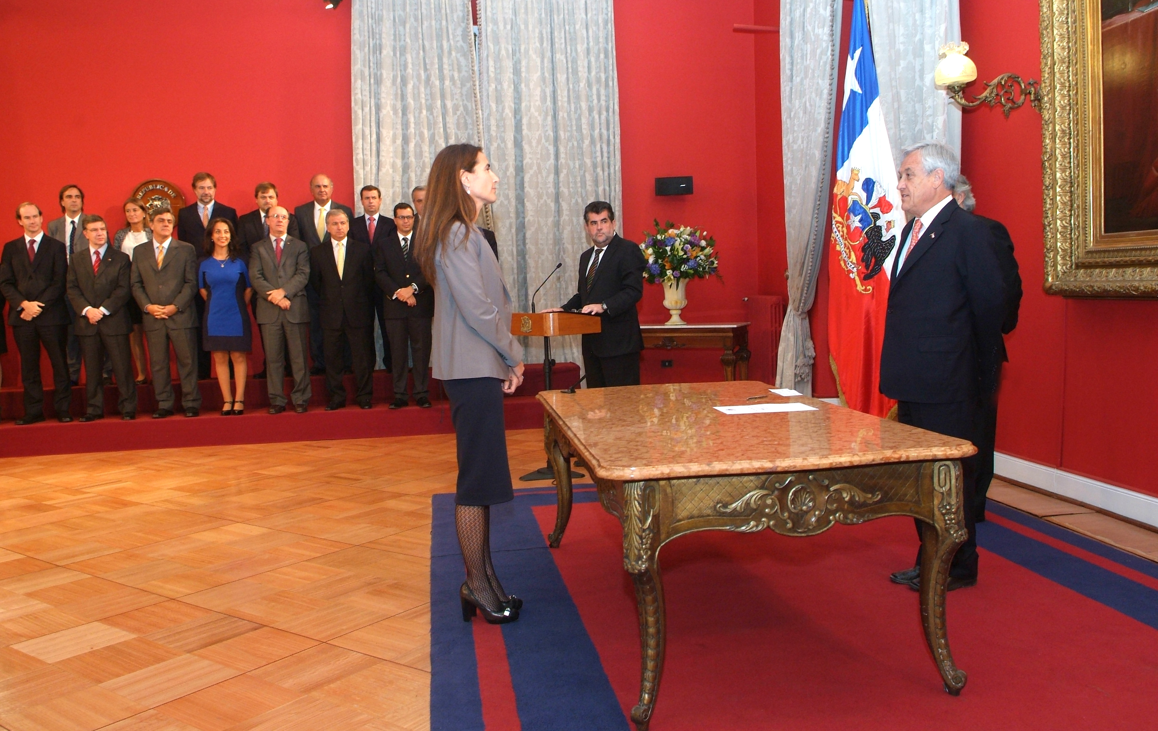 Carolina Schmidit asumiendo como ministra de Educación de Chile, 22 de abril de 2013.